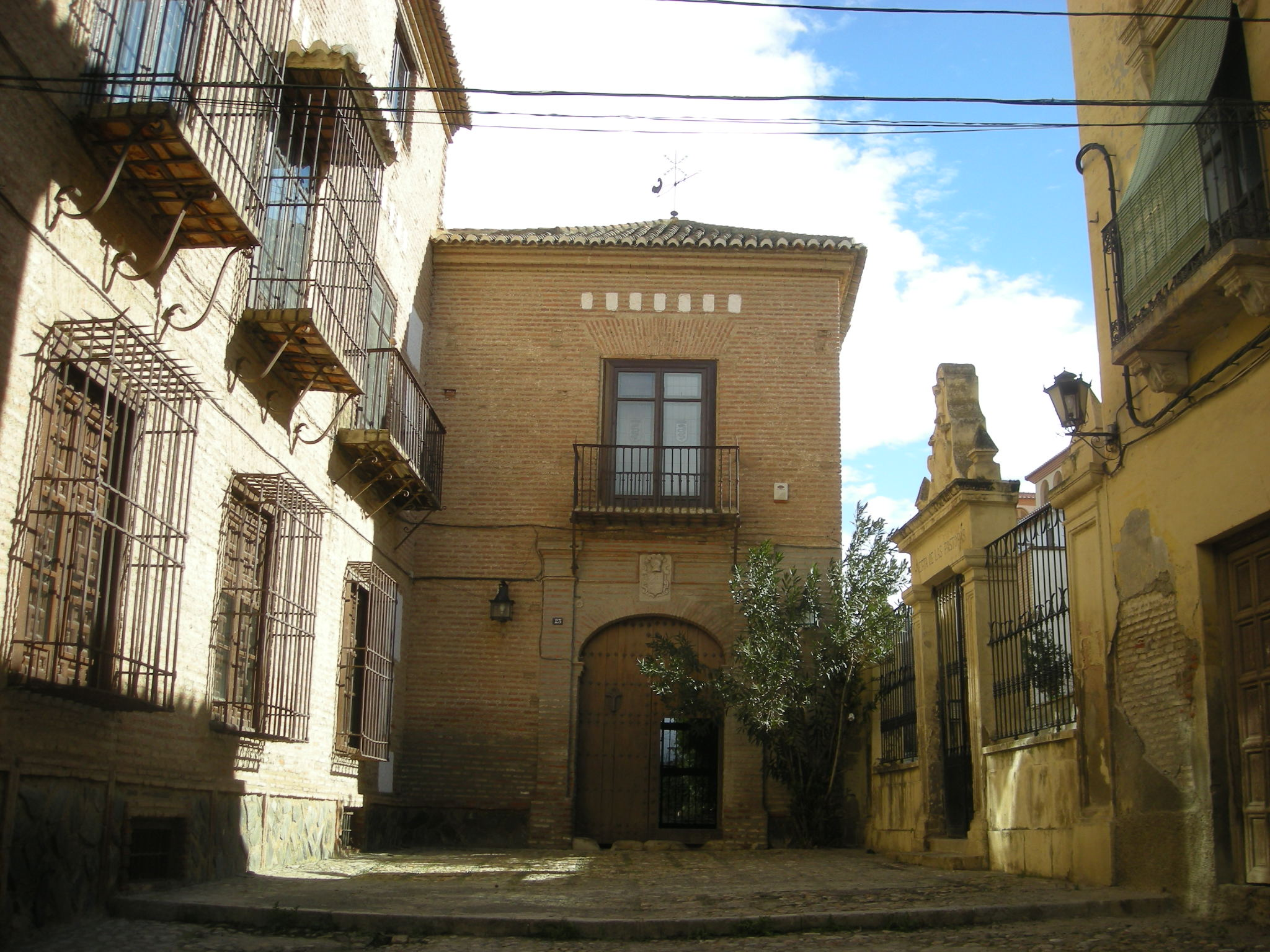 Callejón de la zona de Santiago, en Guadix.